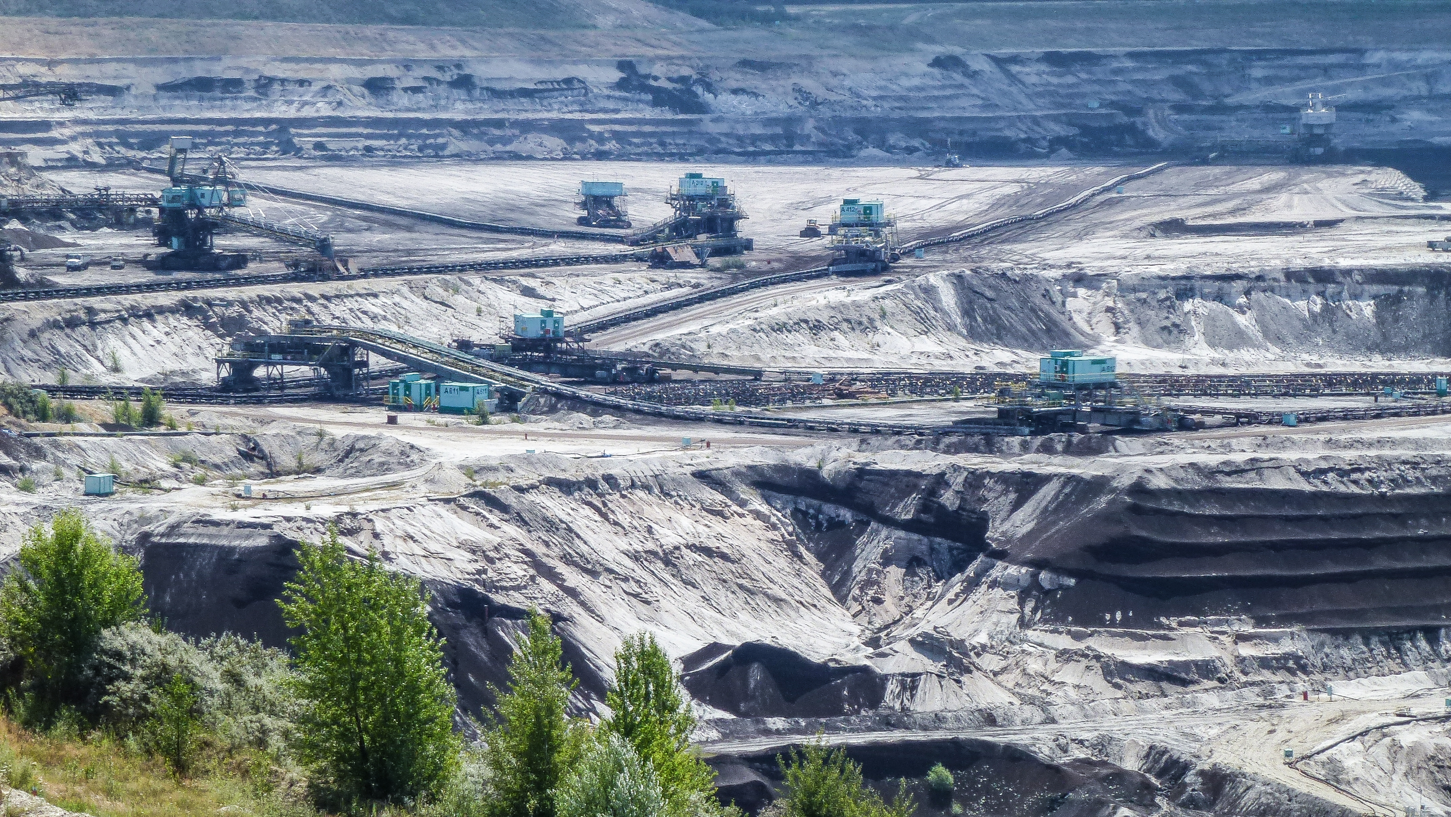 Blick auf den Tagebau Profen